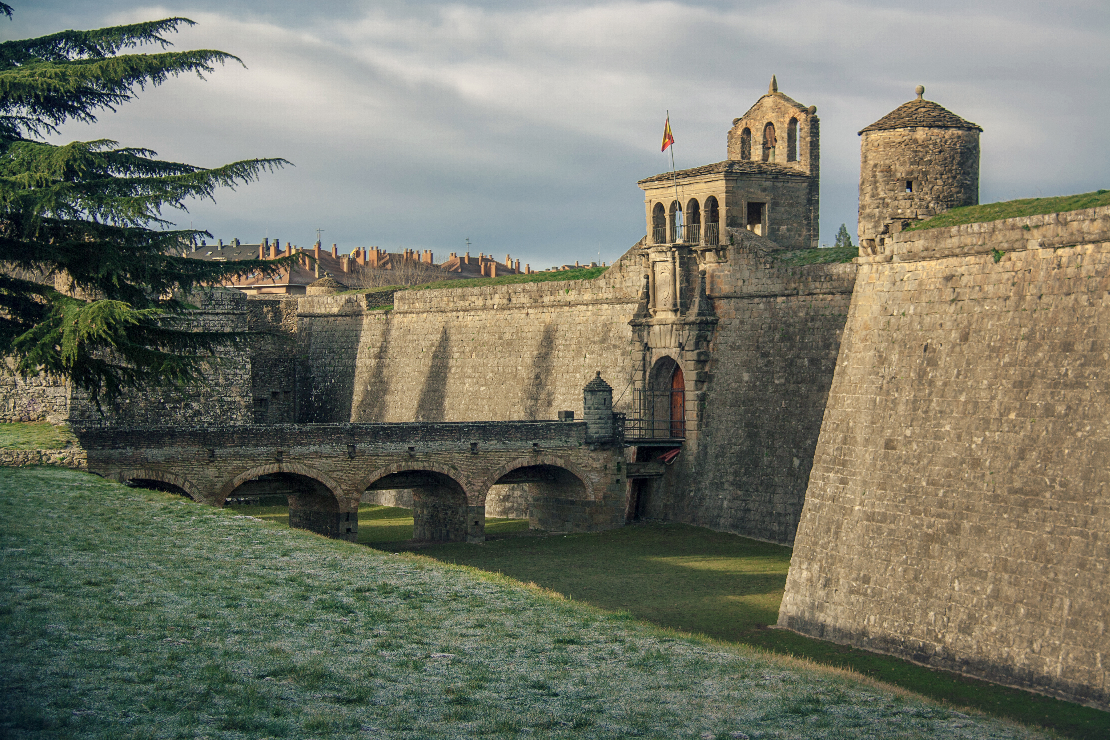 Jaca, España